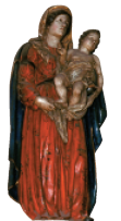 Antxietaren tailan Agoitzen